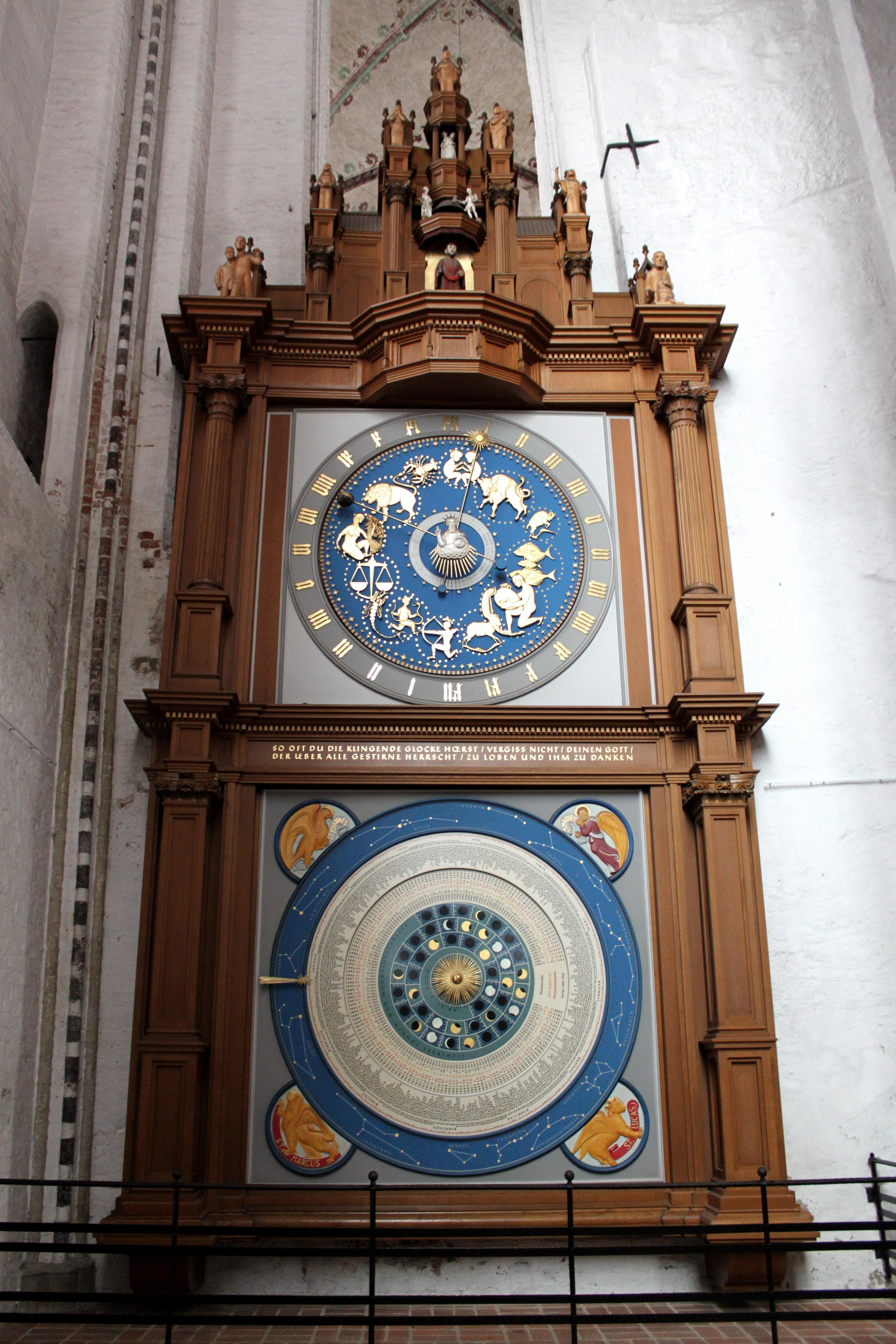 Astronomische Uhr in der Lübecker Marienkirche